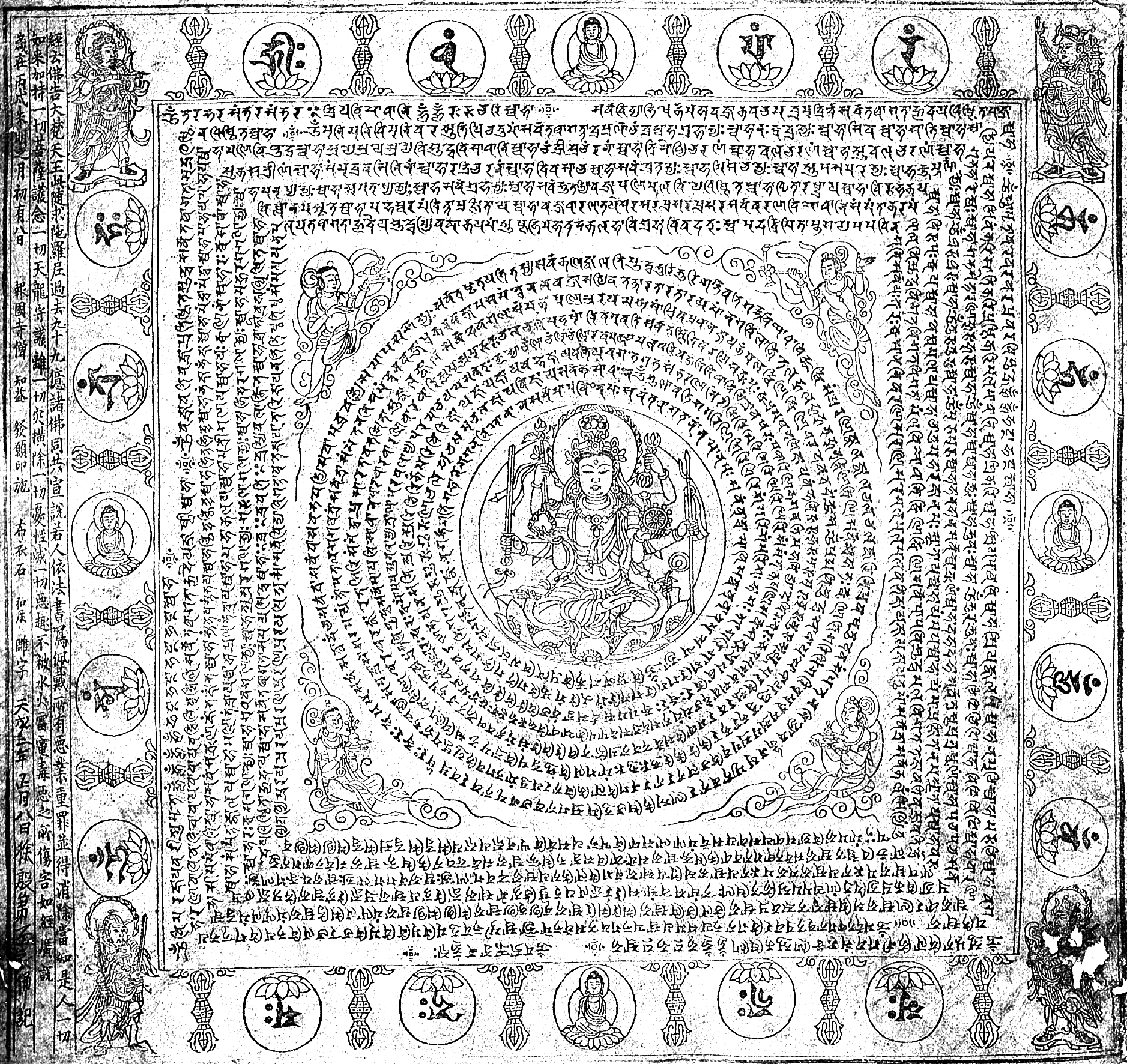 大隨求陀羅尼，(五代十國時期)後唐927年，1978年中國河南省洛陽市東郊出土。